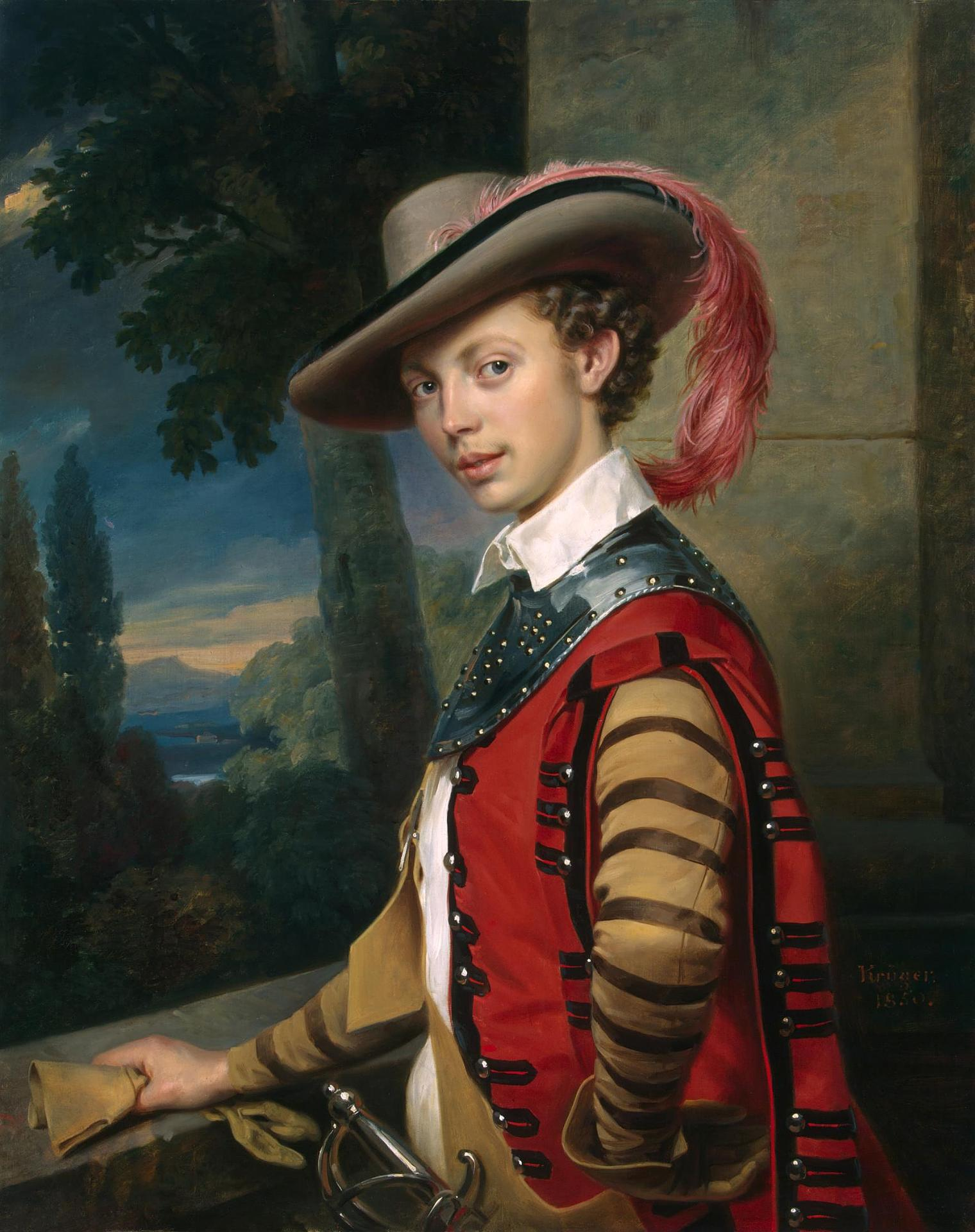 Портрет князя Николая Ивановича Салтыкова (1830-1901) в костюме. Сын князя Ивана Дмитриевича Салтыкова (1797—1832) от брака его с Елизаветой Павловной Строгановой (1802—1863), действительный тайный советник, обер-церемониймейстер.